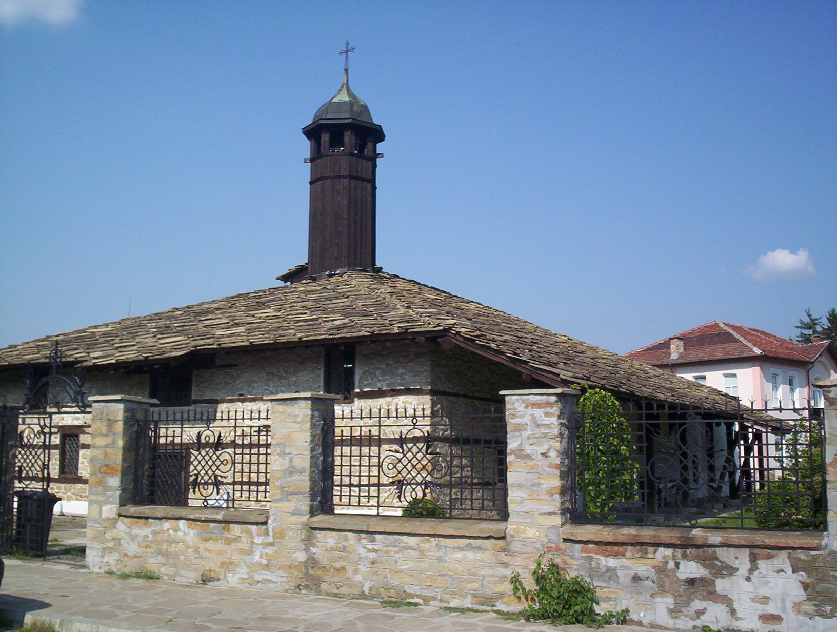 Трявна